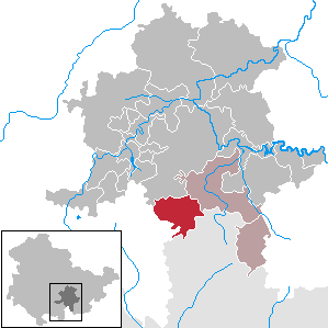 Gräfenthal in Thuringia - District Saalfeld-Rudolstadt